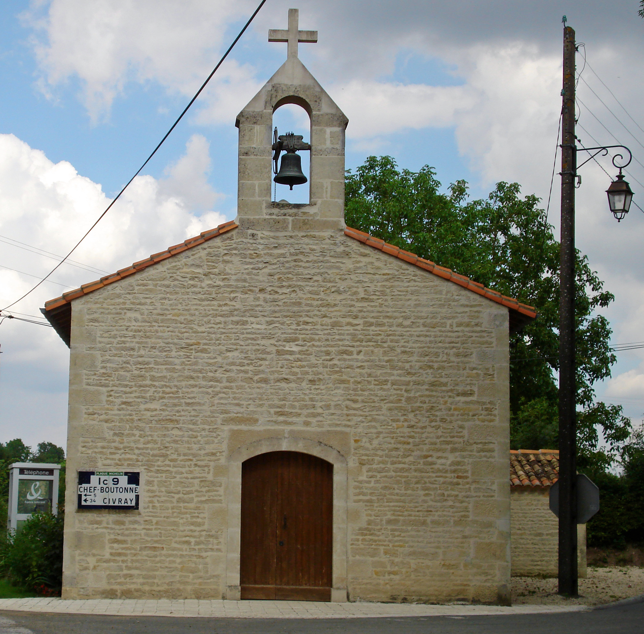 L'église de Crézières